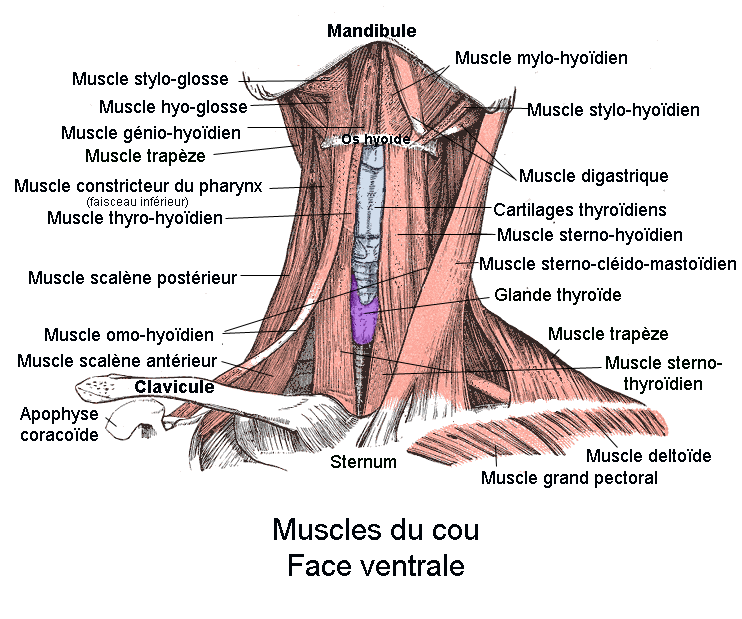 Muscles du cou. Vue antérieure. Anatomie humaine